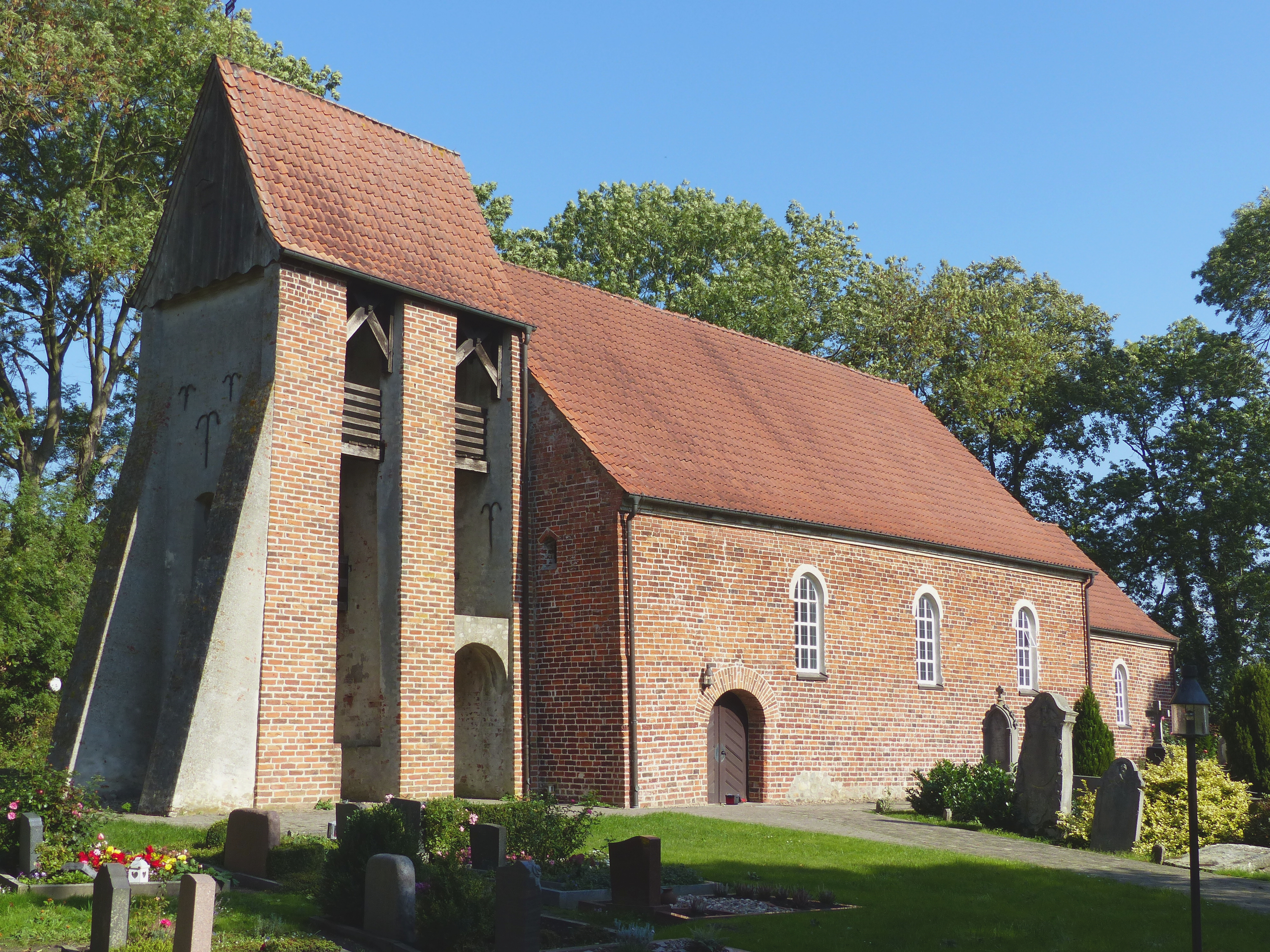 Dorfkirche in Aschwarden-Bruch von Südwesten